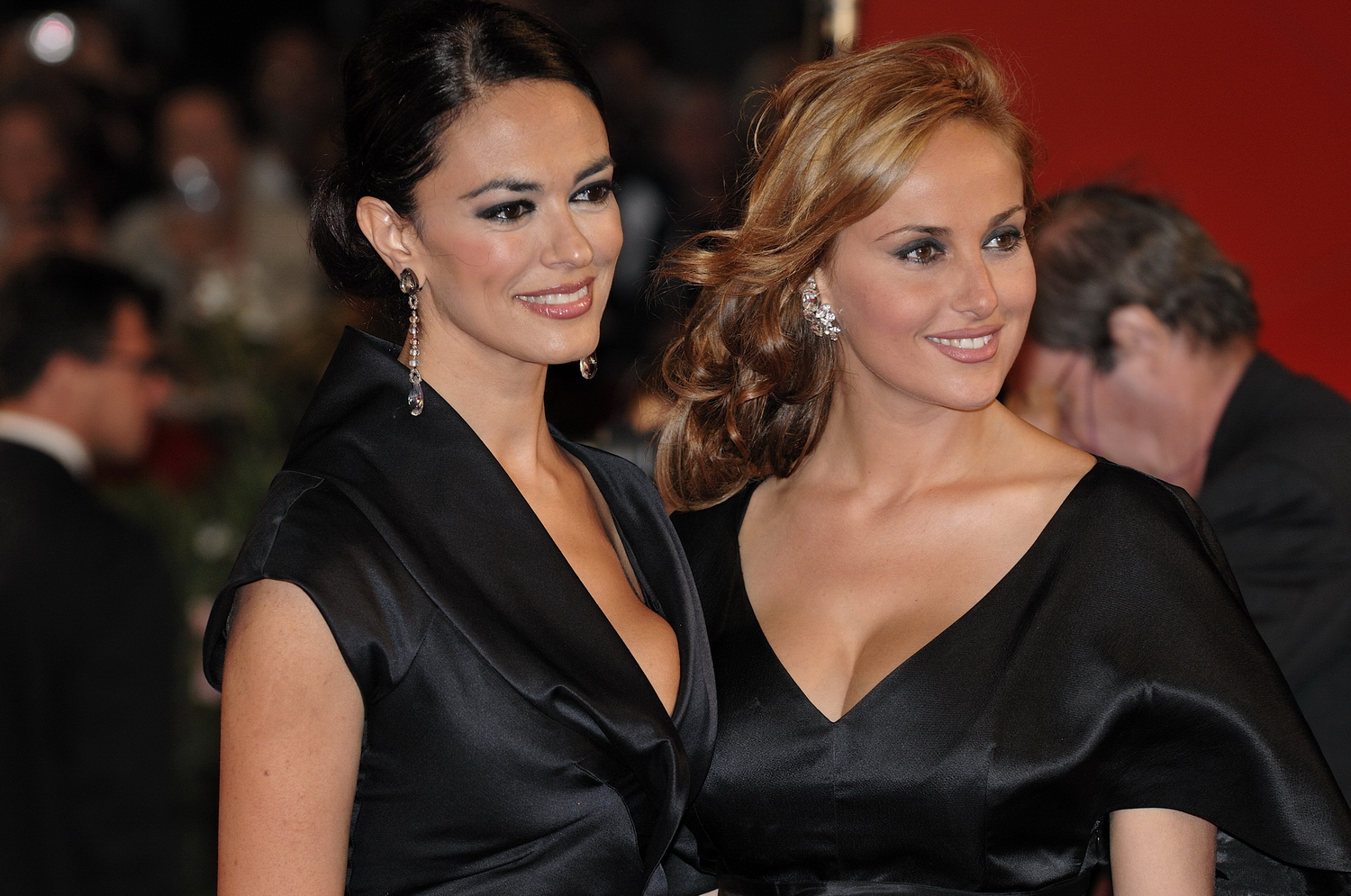 66ème Festival du Cinéma de Venise (Mostra), 10ème jour (11/09/2009) Tapis rouge avec Maria Grazia Cucinotta and Isabelle Adriani